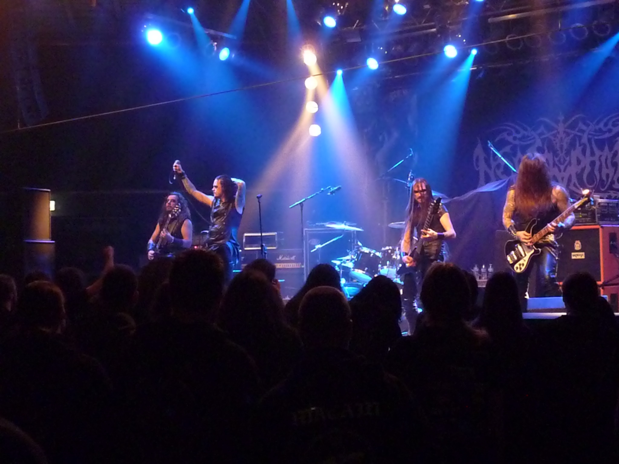 Necrophobic live in der Garage Saarbrücken